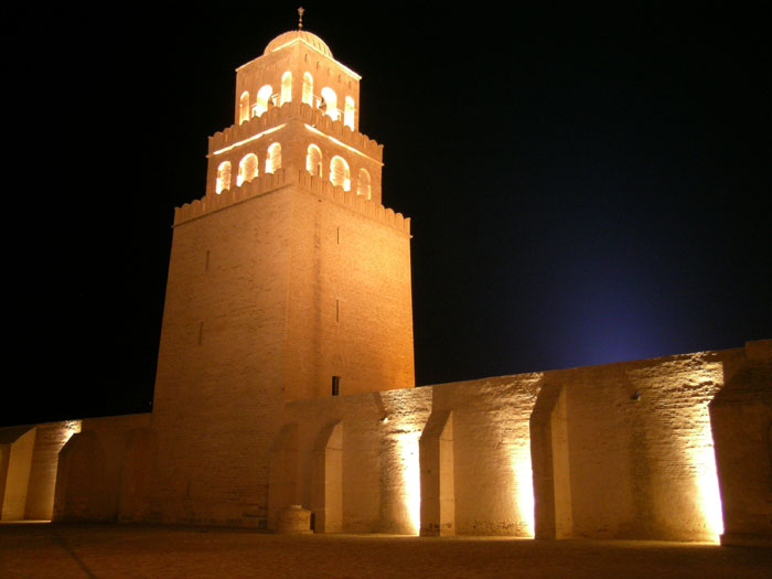 The Mosque of Kairouan in Tunisia by night - Mosquée de Kairouan en Tunisie de nuit - جامع عقبة بن نافع بالقيروان بتونس